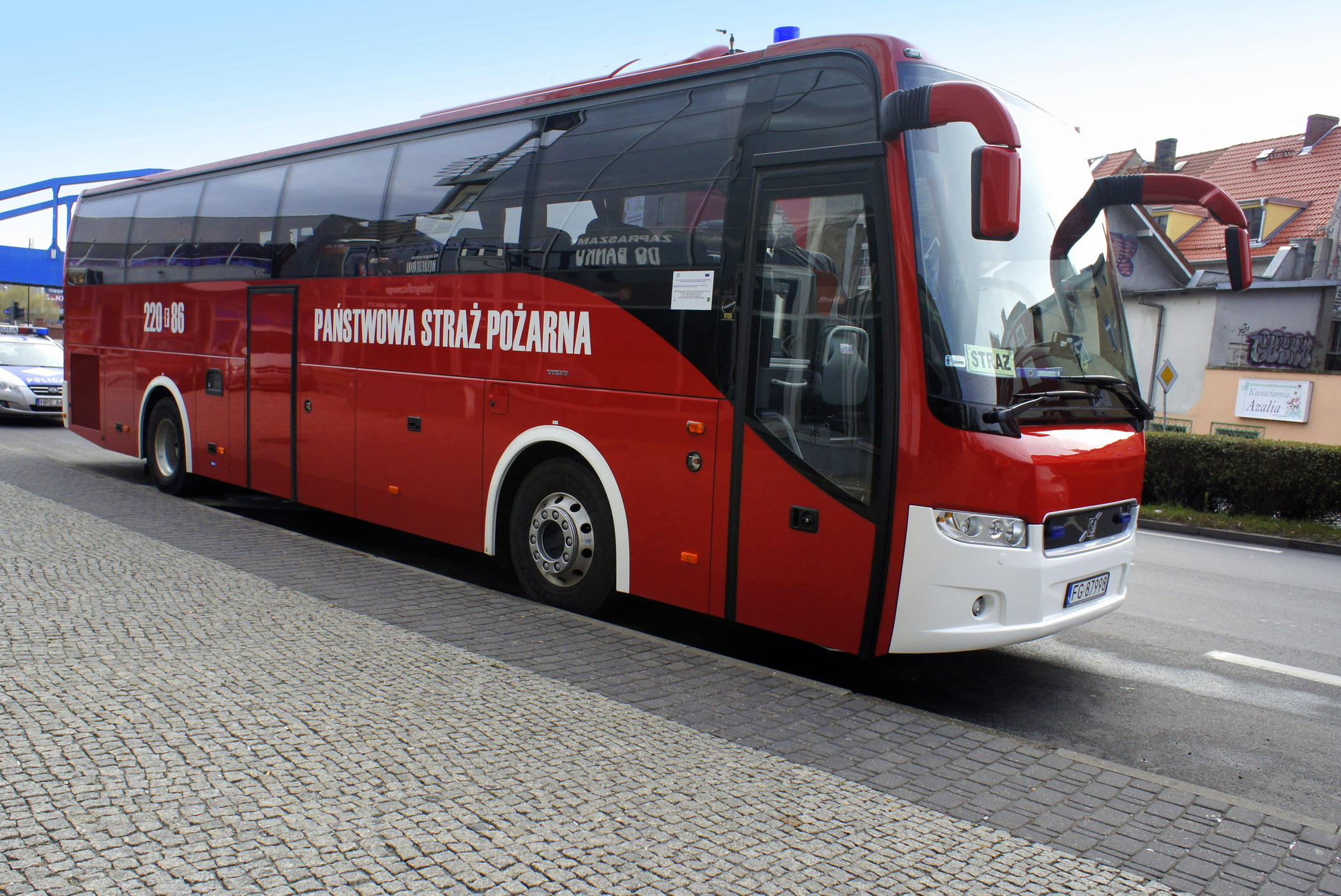 Autobus Volvo 9700 o oznaczeniu operacyjnym 220 F 86 - pojazd kwatermistrzowski Komendy Wojewódzkiej PSP w Gorzowie Wlkp.